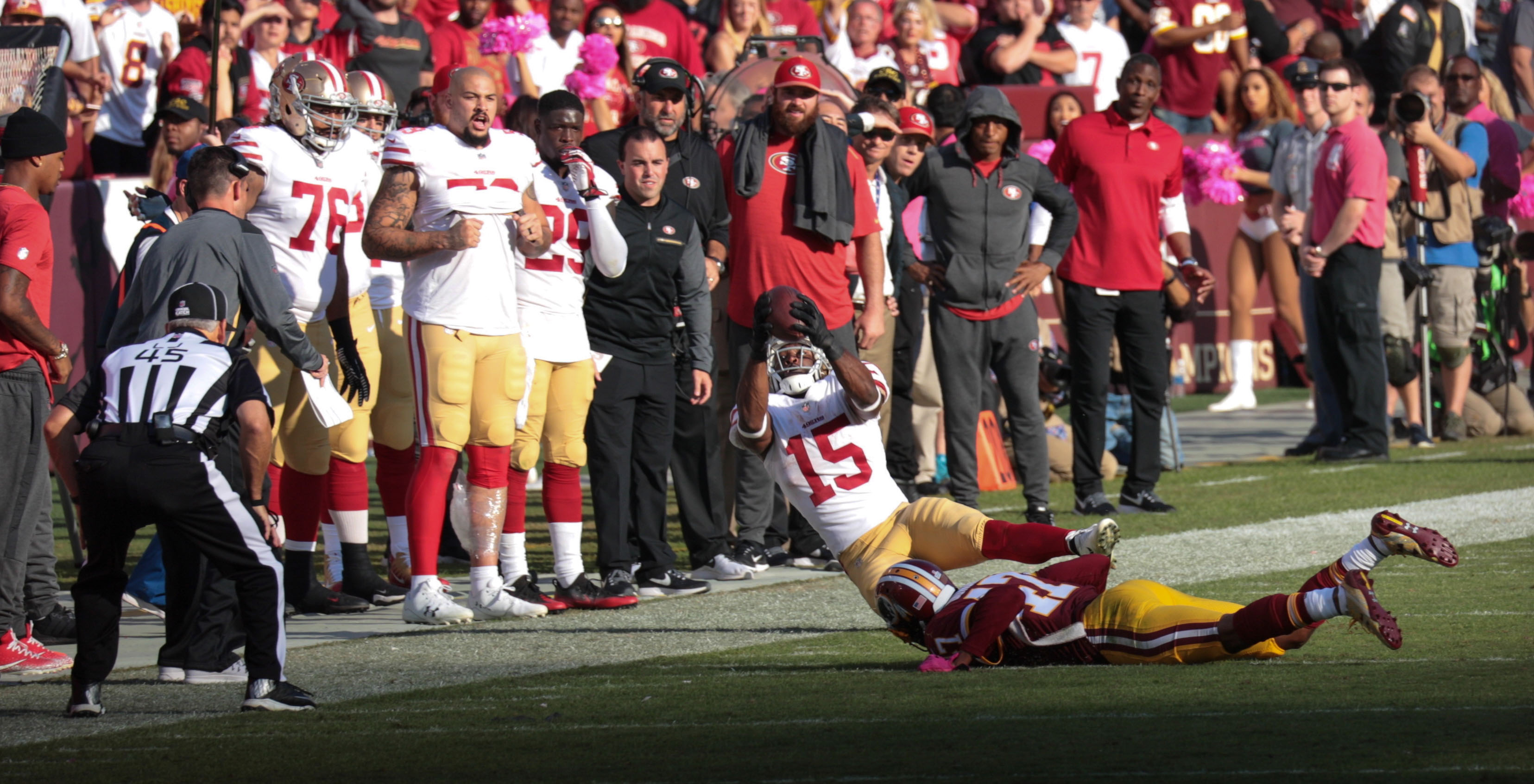 Pierre Garcon